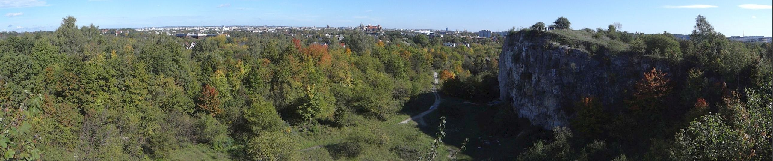 Widok na Kraków z Zakrzówka